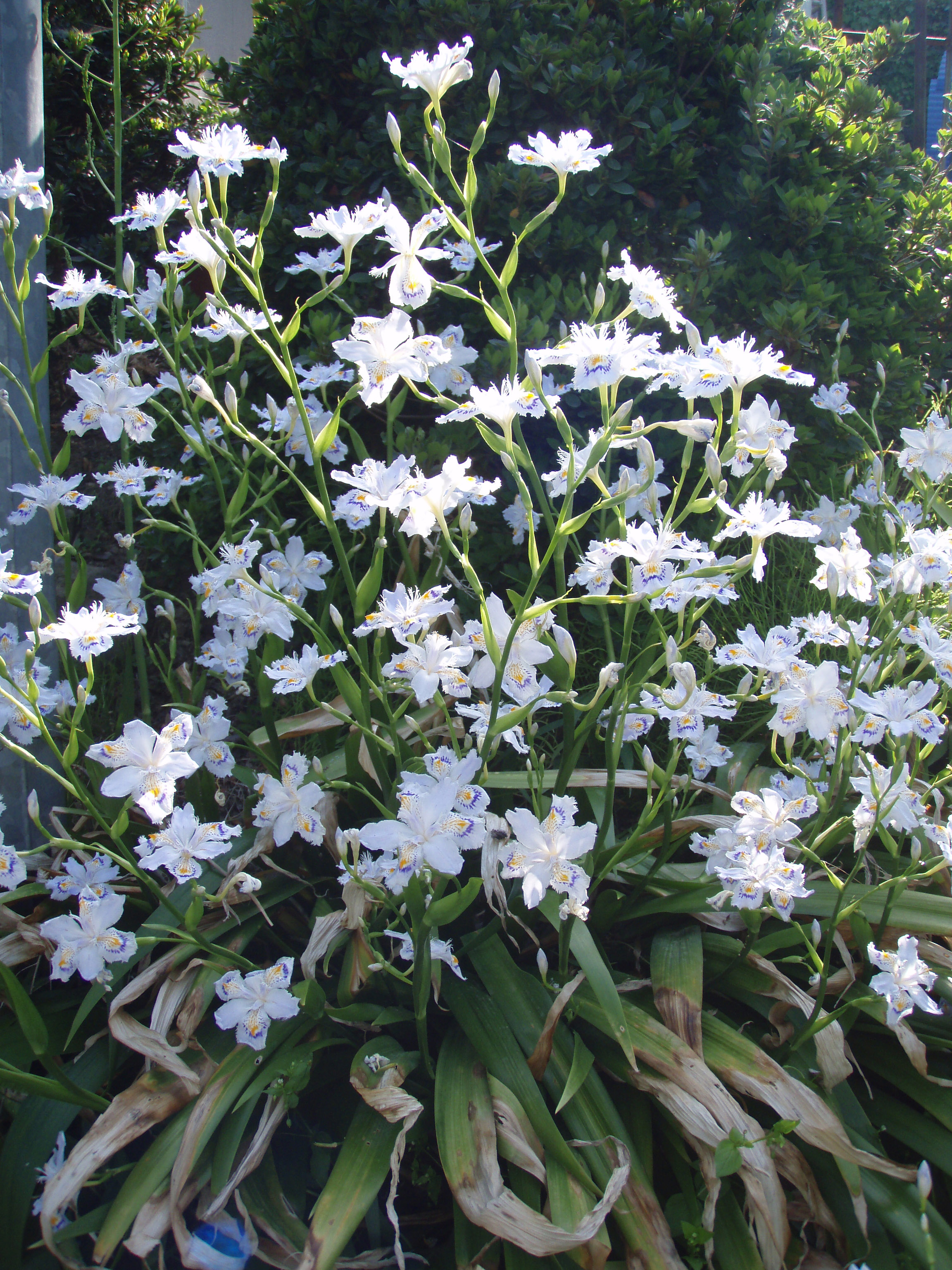 シャガの花(Nagano pref. Japan)